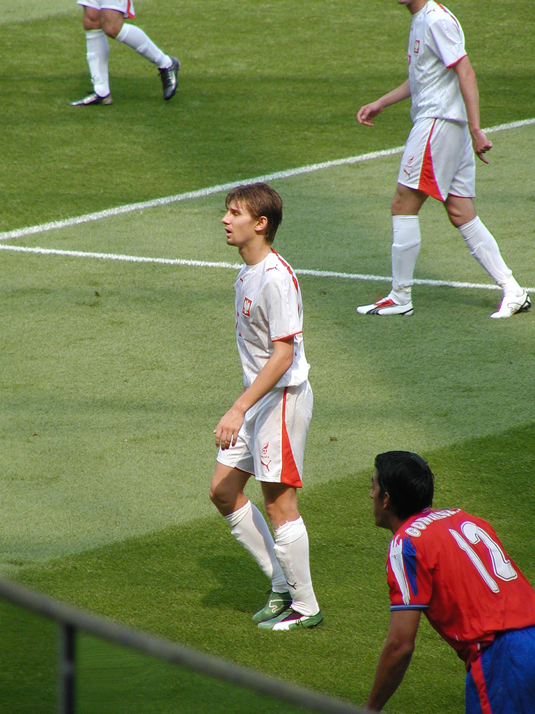 Ebi Smolarek